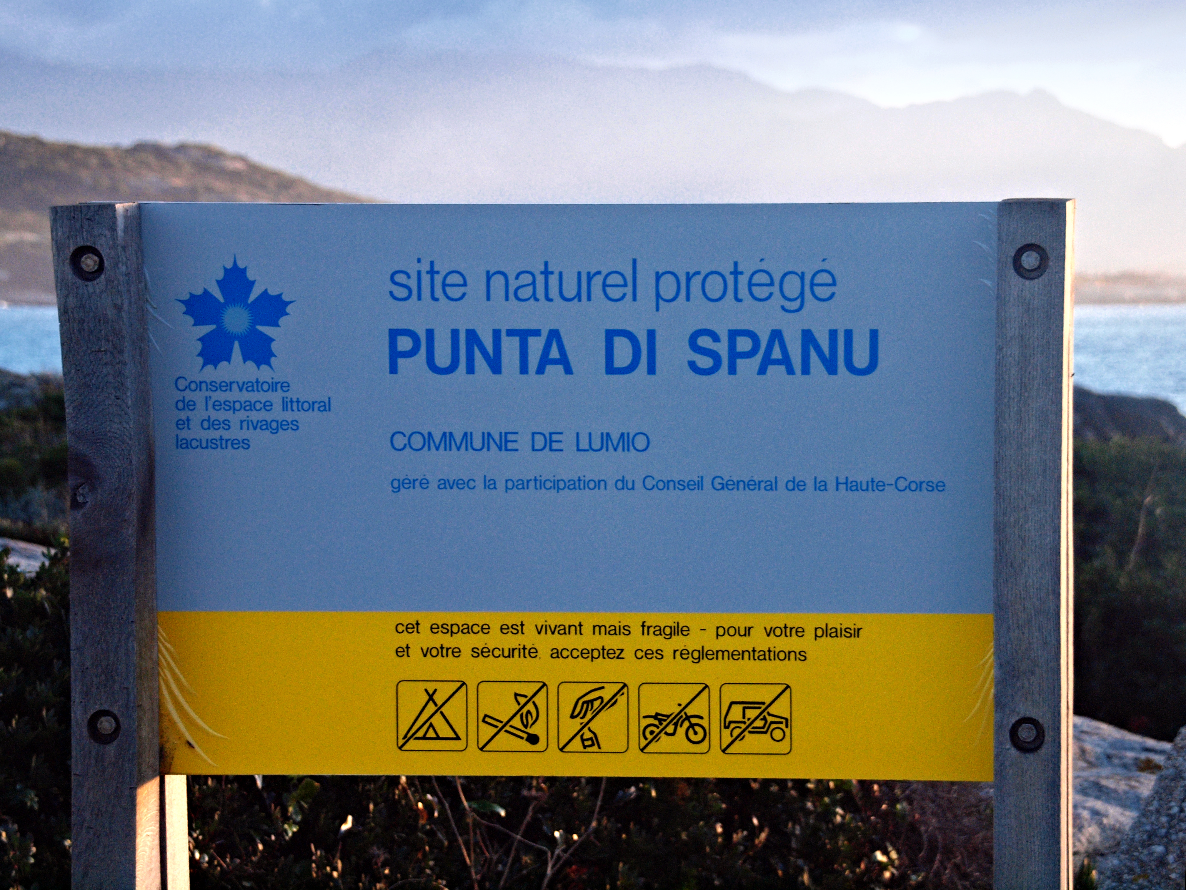 Lumio (Corse) - Site naturel protégé de Punta di Spanu